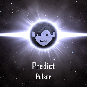 Обложка альбома группы "Predict"